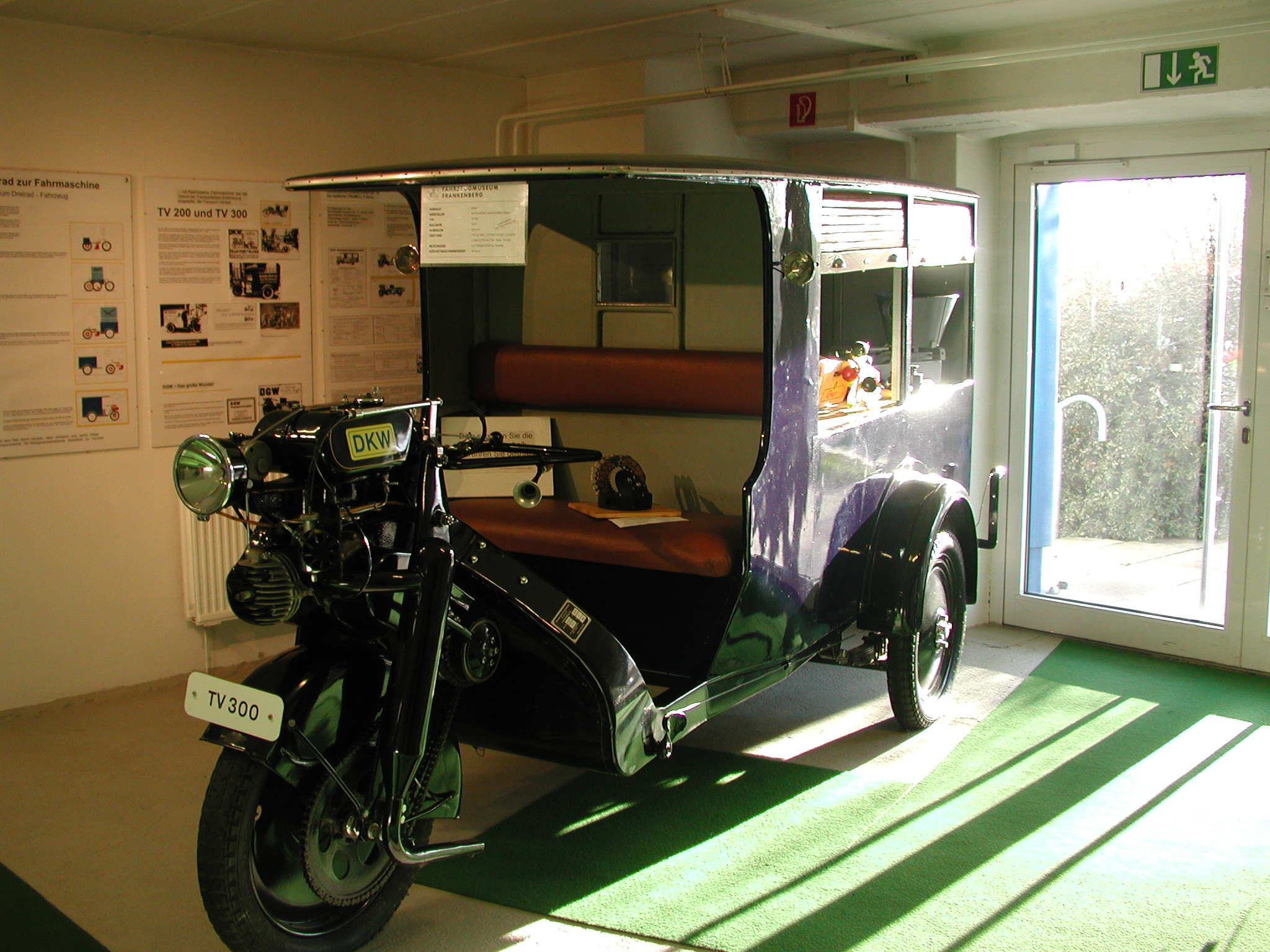 restaurierter Framo TV300